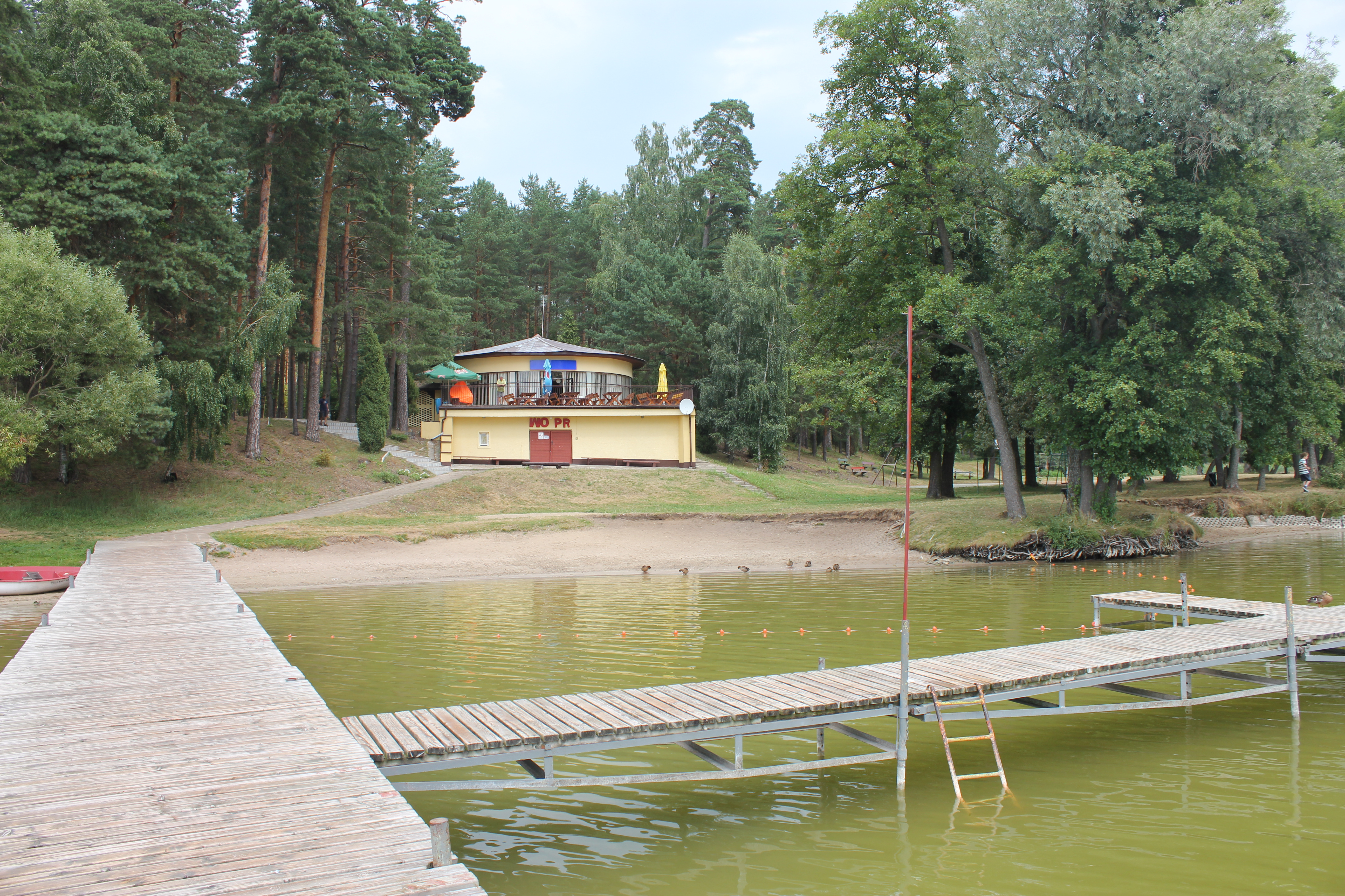 Restauracja ośrodka "Skowronek" nad jeziorem Sajno.